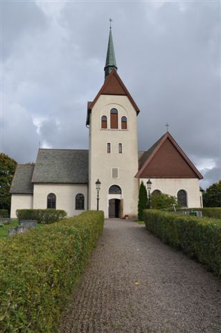 Järsnäs kyrka.